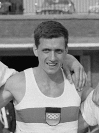 Europese roeikampioenschappen Bosbaan, Deense en Duitse met poserend. ID